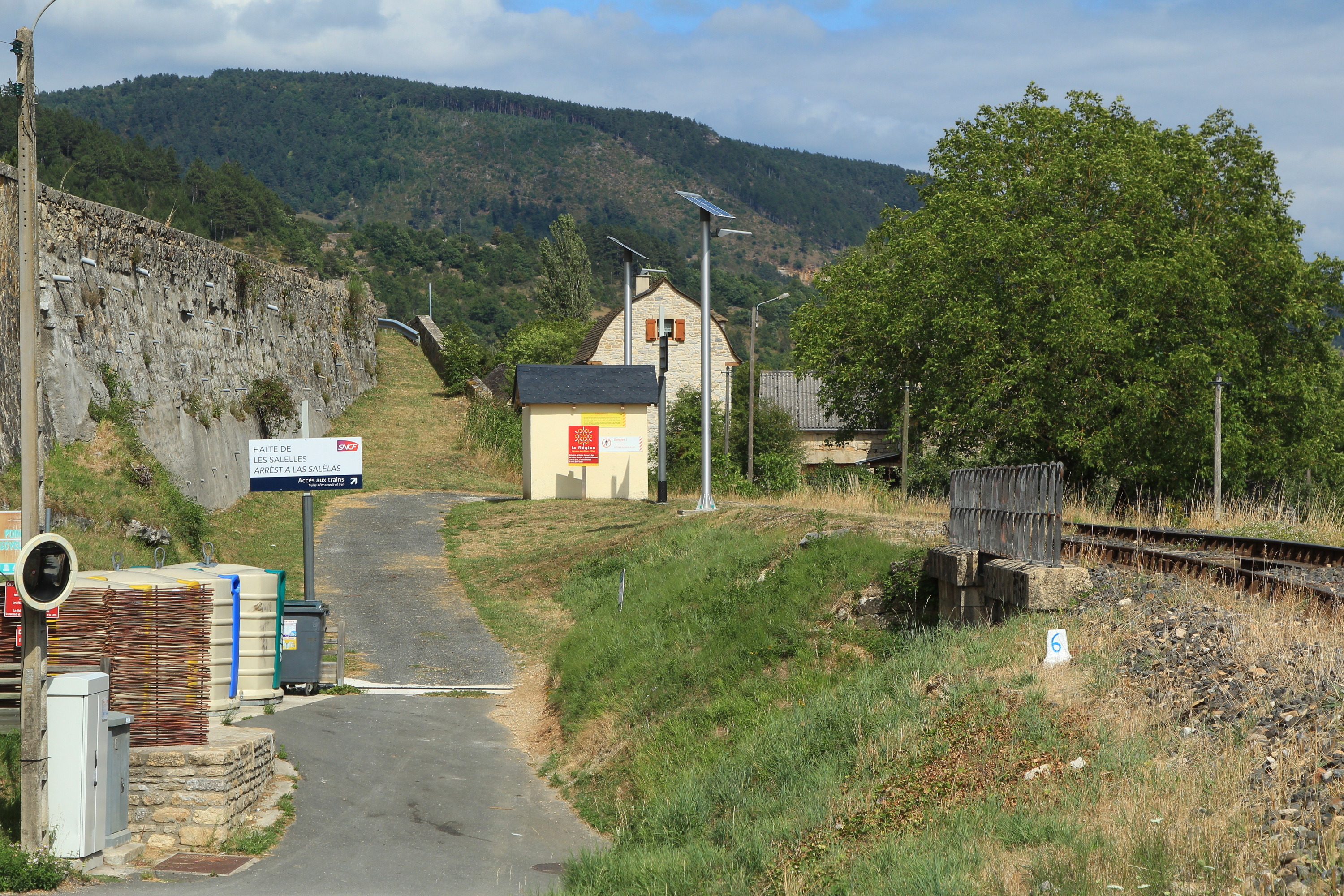 Vue générale de la halte des Salelles.